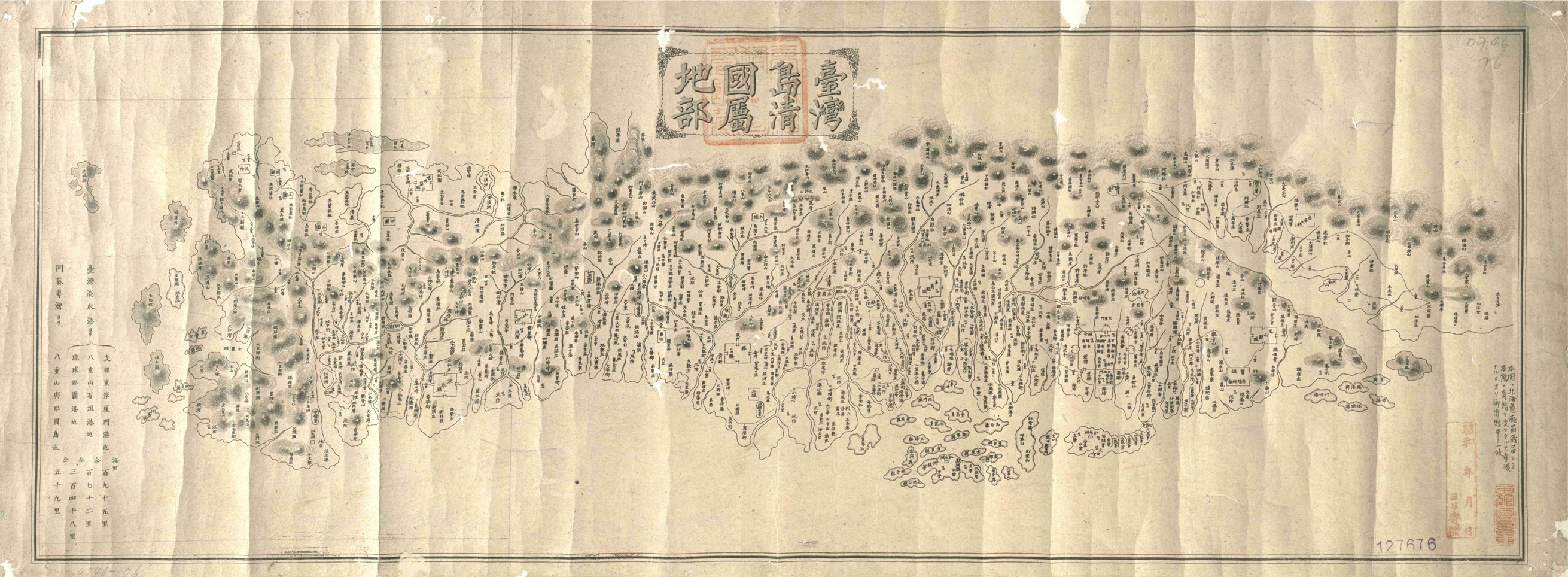 〈臺灣島清國屬地部〉。此圖系根據臺灣鎮總兵張其光藏圖改繪，約刻板於1873年。